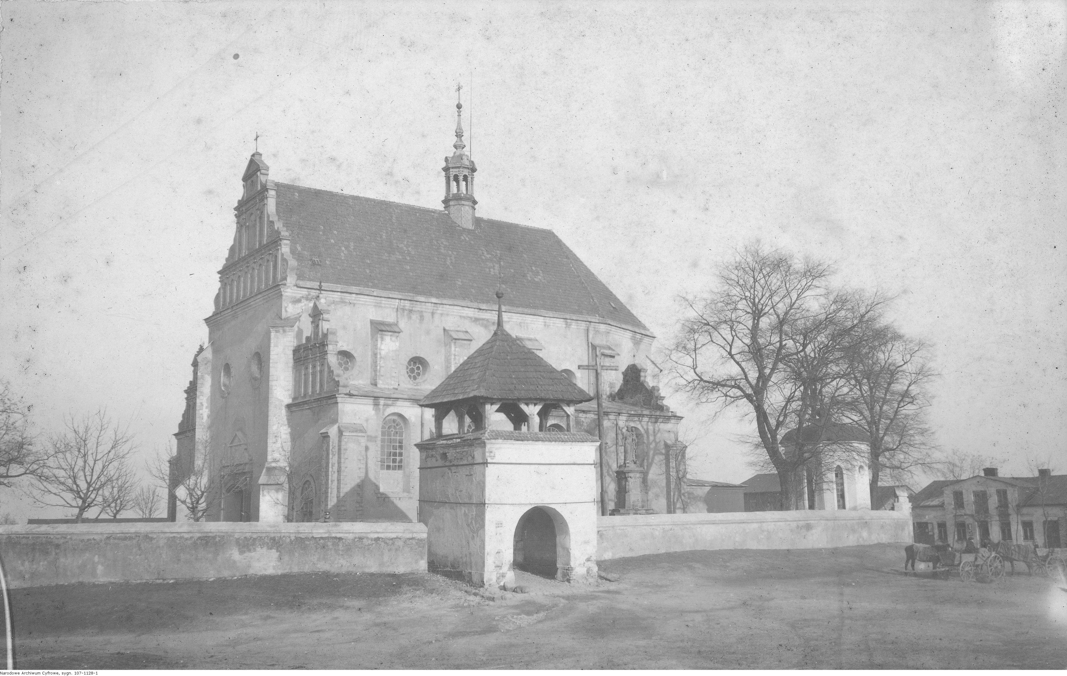 Kościół św. Katarzyny Aleksandryjskiej w Poddębicach.